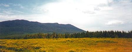 Mont St-Joseph (Estrie) vu de la route menant au Parc National du Mont-Mégantic